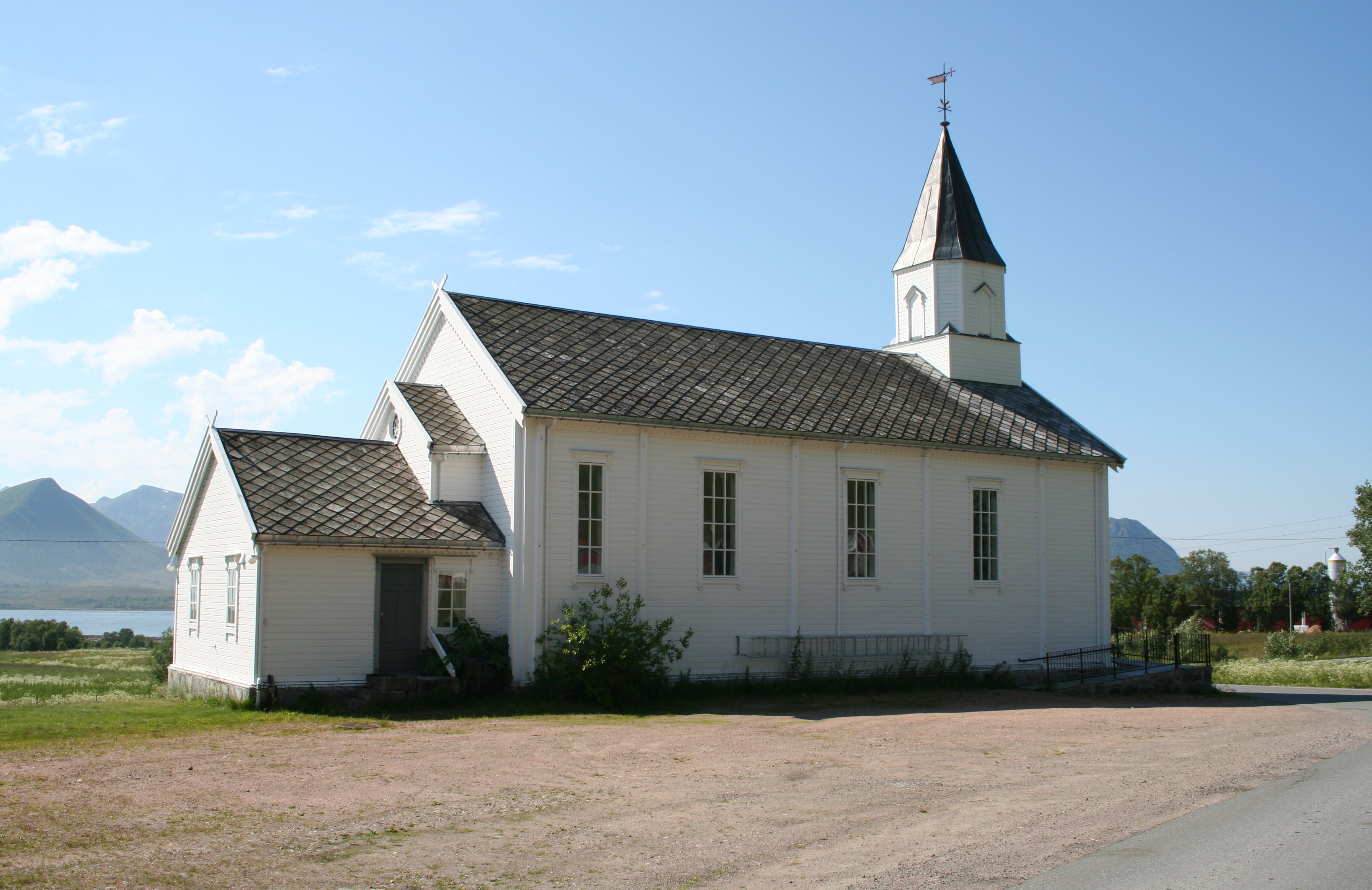 Bjørnskinn Church in Andøy, Norway